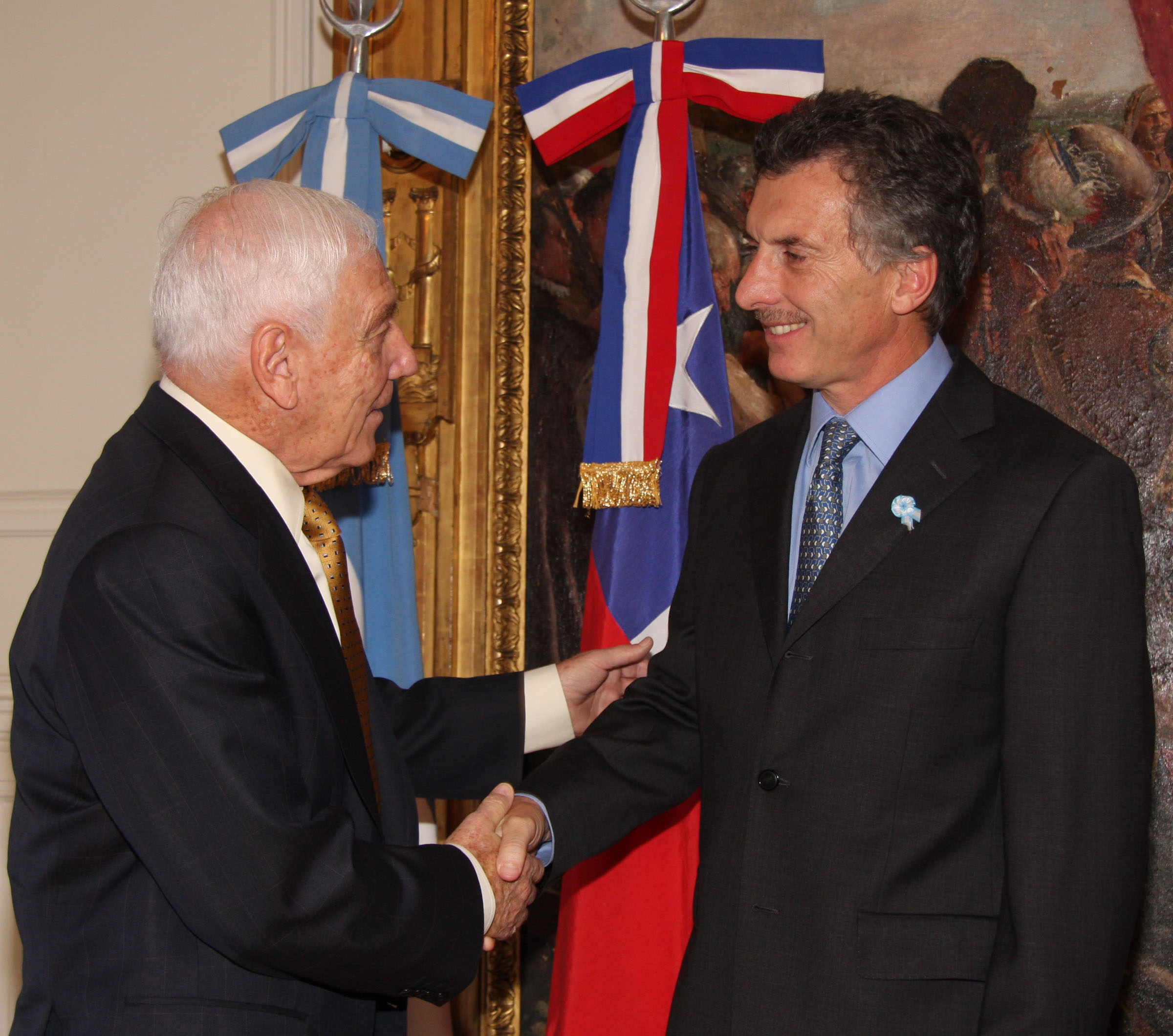 Buenos Aires. El Jefe de Gobierno de la Ciudad de Buenos Aires, Mauricio Macri, recibe en el Salon Blanco del Palacio de Gobierno al flamante embajador de Chile, Miguel Otero Lathrop, quien le agradeció por la solidaridad de los porteños luego del terremoto de marzo. Foto Sandra Hernandez-gv/GCBA.